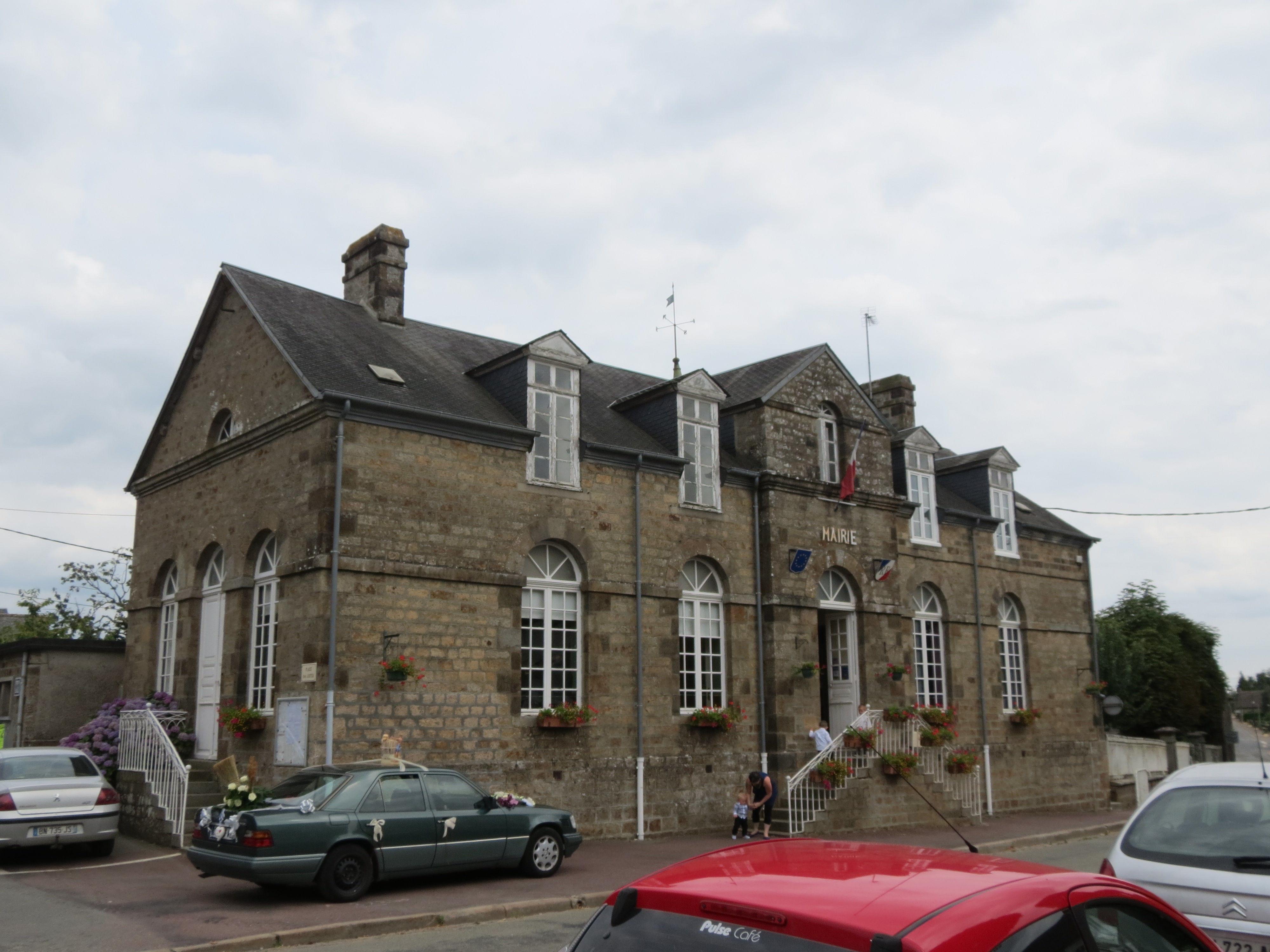 Mairie de Passais.